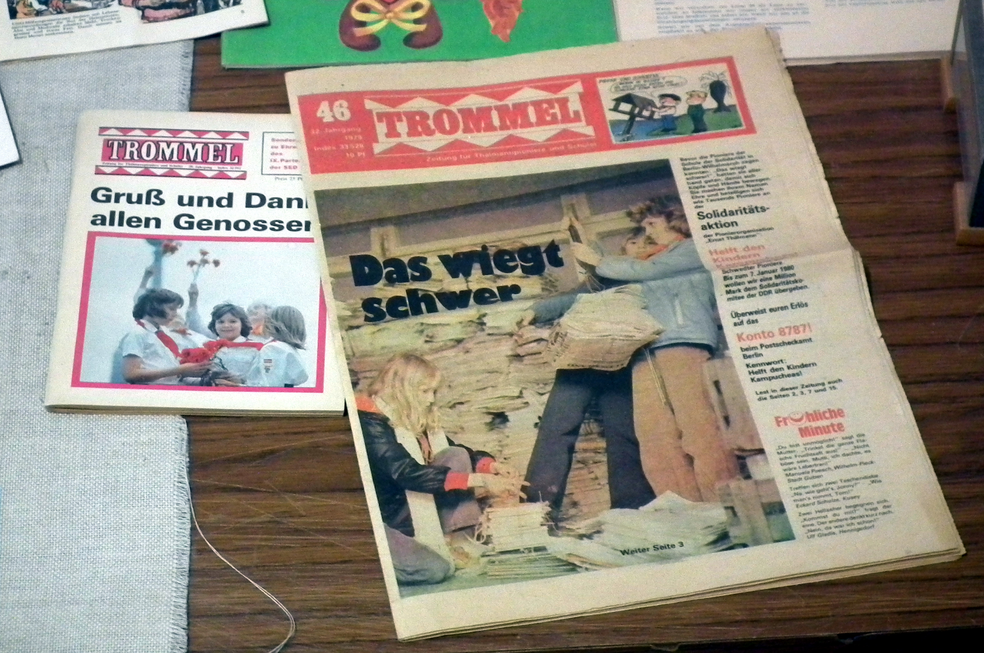 Zeitschrift Trommel, DDR-Museum Pirna, Veröffentlicht mit Genehmigung der Museumsleitung